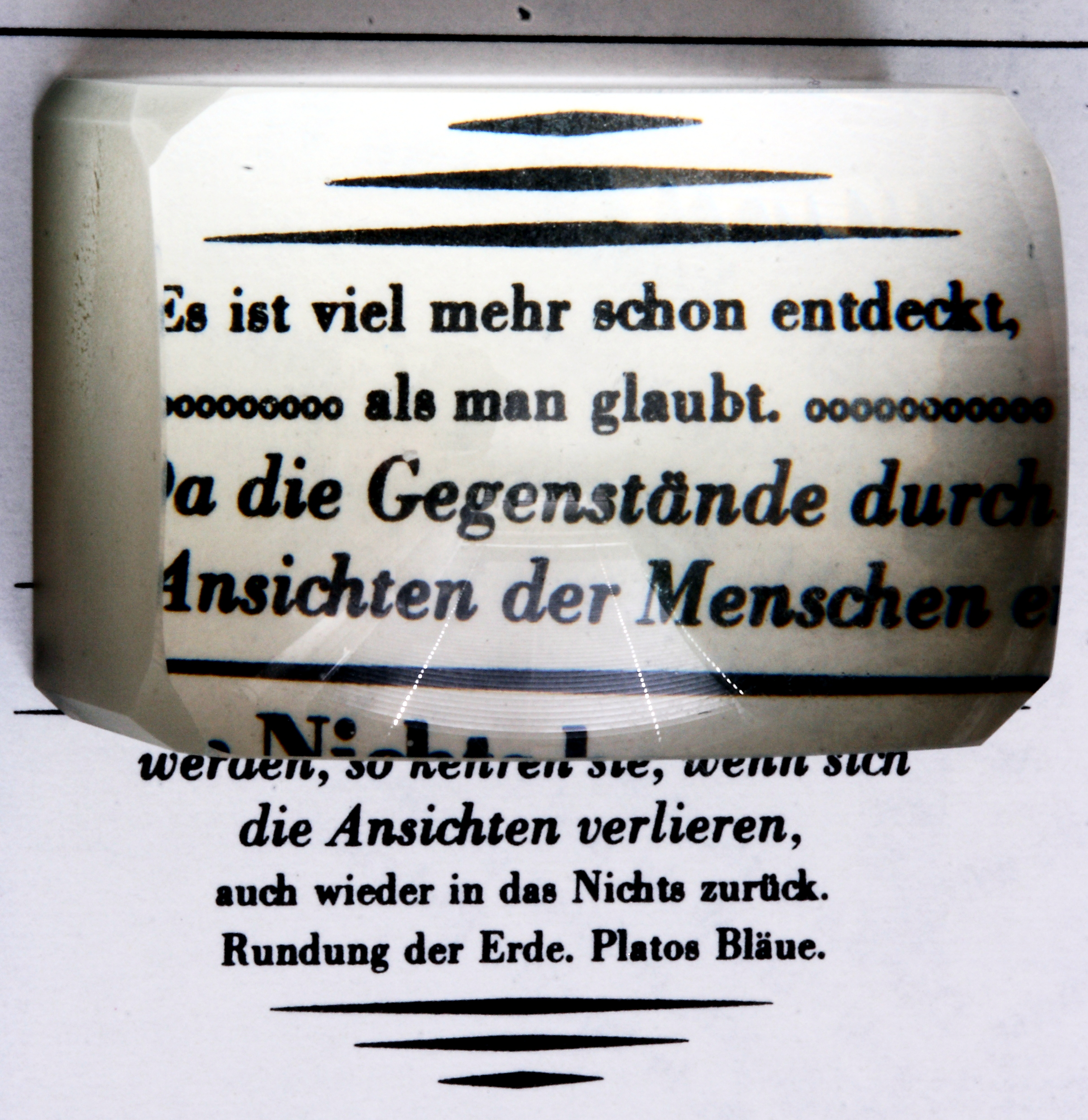 aufgelegter Lesestein